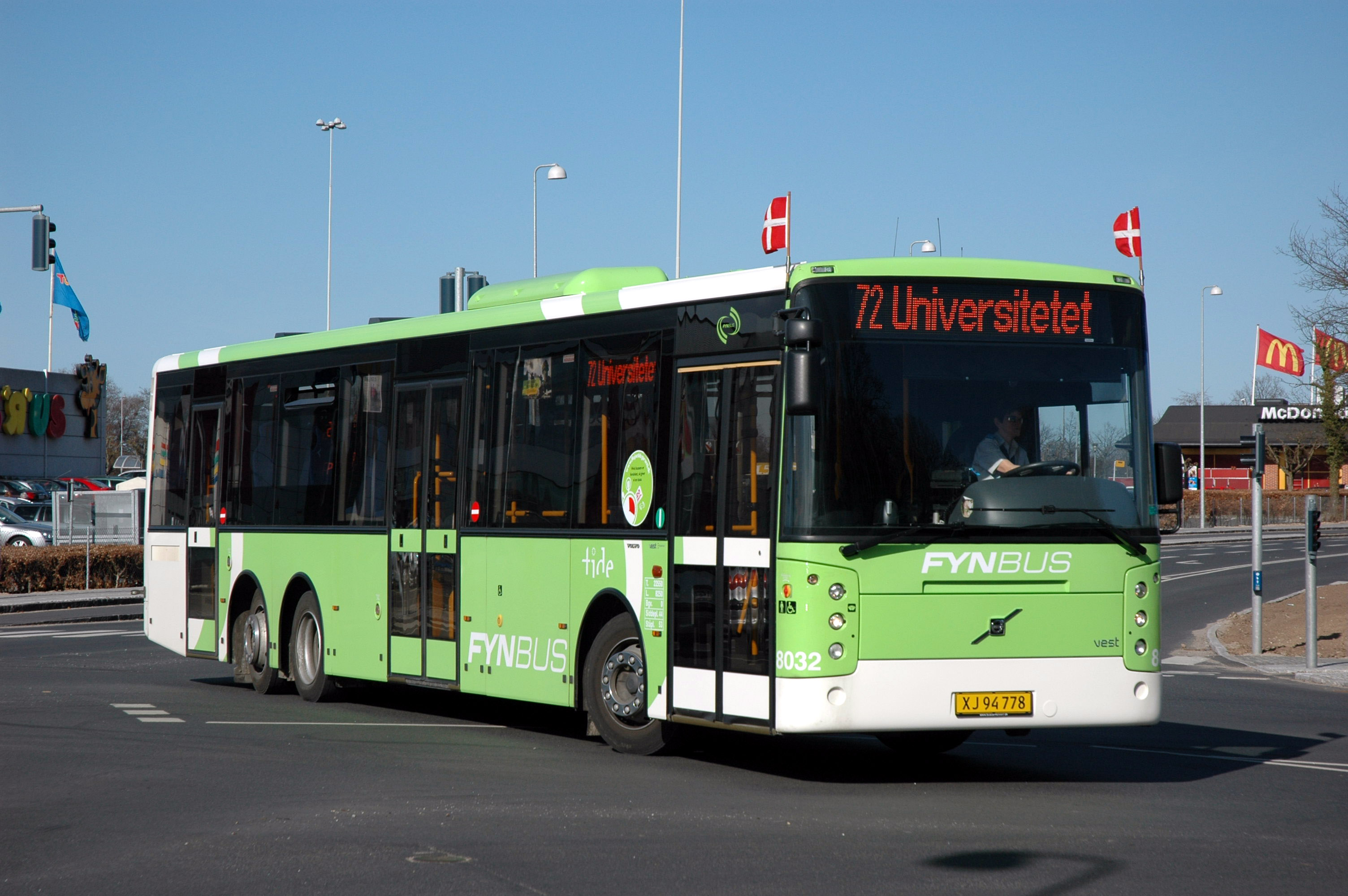 Tide Bus 8032 på Stærmosegårdsvej i Odense som bybus linje 72.